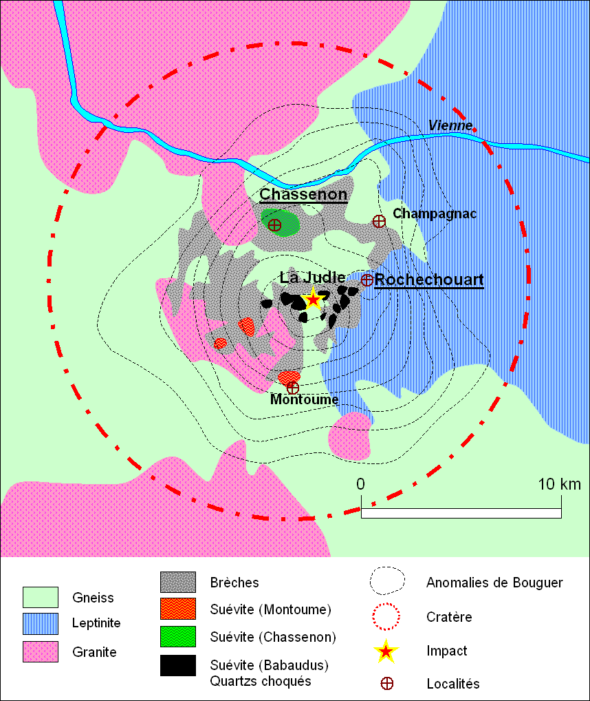 Carte de l'emprise du cratère de la météorite de Rochechouart-Chassenon (France). Réalisation personnelle de Frédéric d'après Kelley & Spray[1] et Pohl & Ernstson[2] ↑ Kelley, Simon P.; Spray, John G. : "A late triassic age for the Rochechouart impact structure, France", Meteoritics and planetary science 32, p 629-639, 28/05/1997 ↑ Pohl, J.; Ernstson, K.; Lambert, P. : "Gravity measurements in the Rochechouart impact structure, France", Meteoritics, Vol. 13, p.601-603, 12/1978 Réalisation personnelle --Frédéric 24 mai 2006 à 17:32 (CEST)